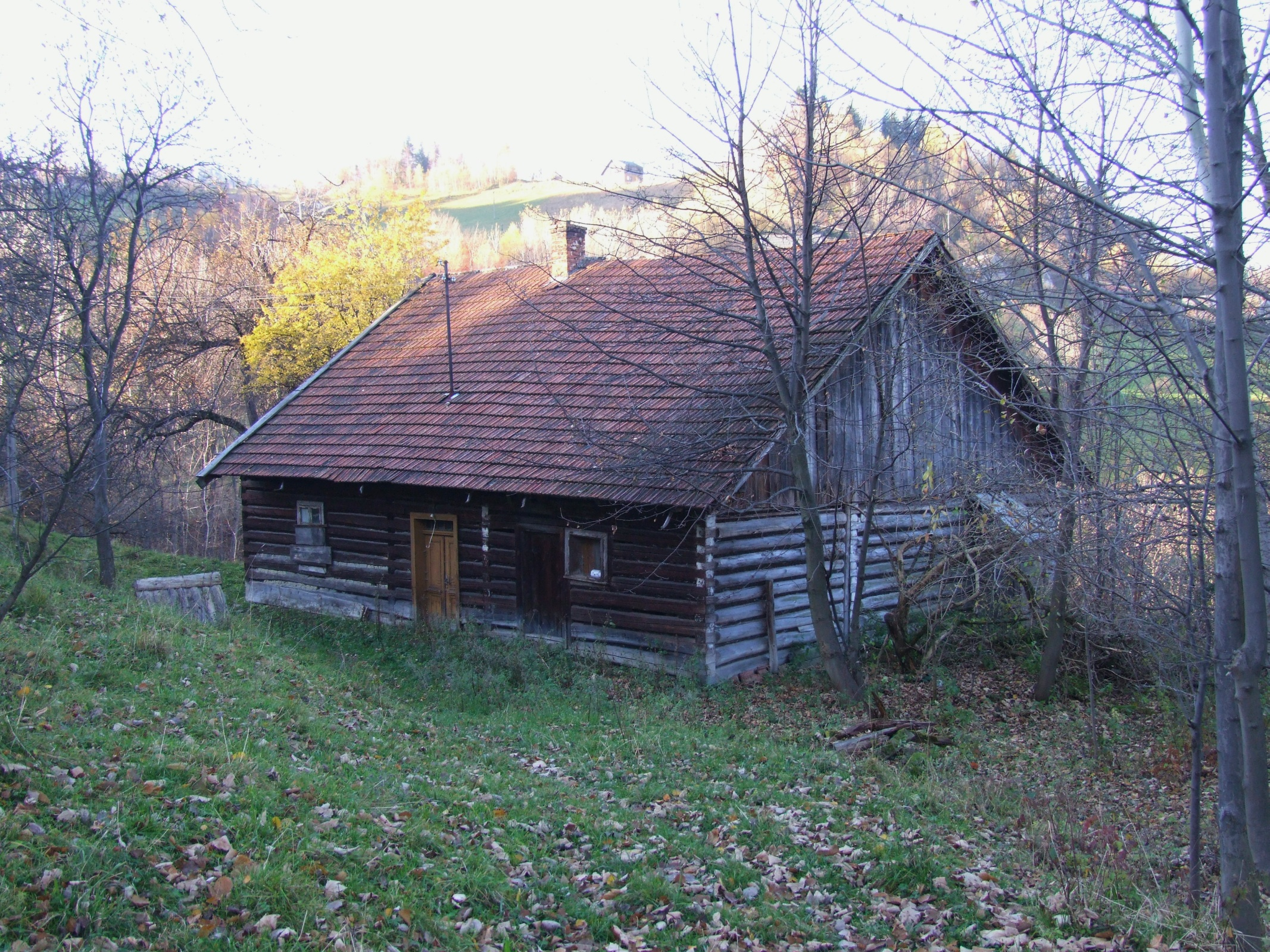 Opuszczony dom w Obidzy - Kitówka